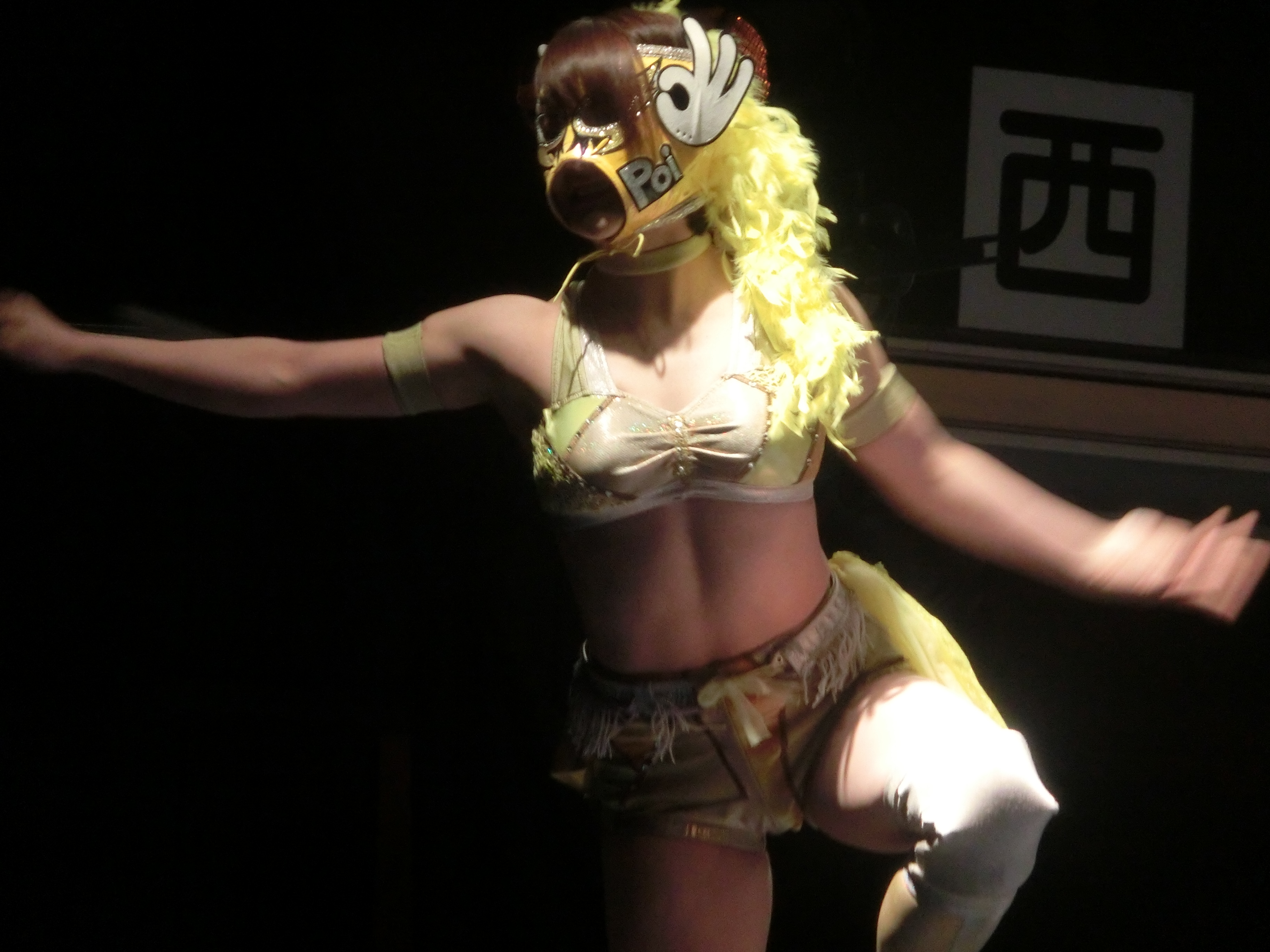 beginning